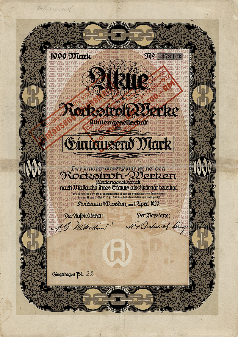 Aktie über 1000 Mark der Rockstroh-Werke AG vom 1. April 1920